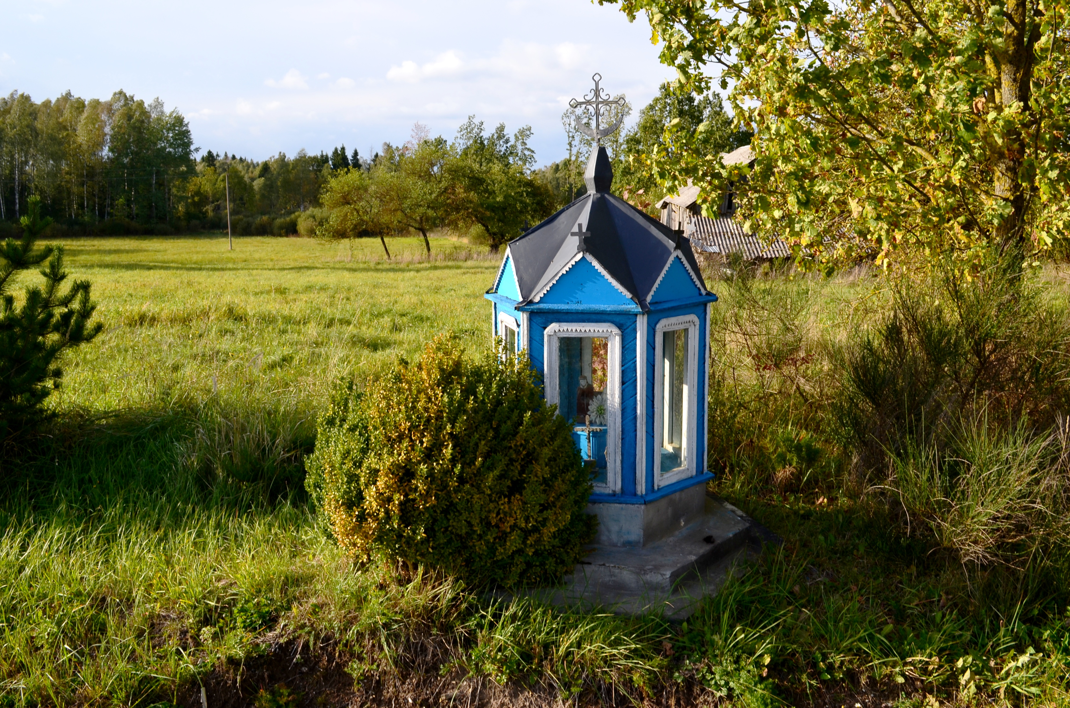 Koplytėlė, Skaborai, Rietavo sav.